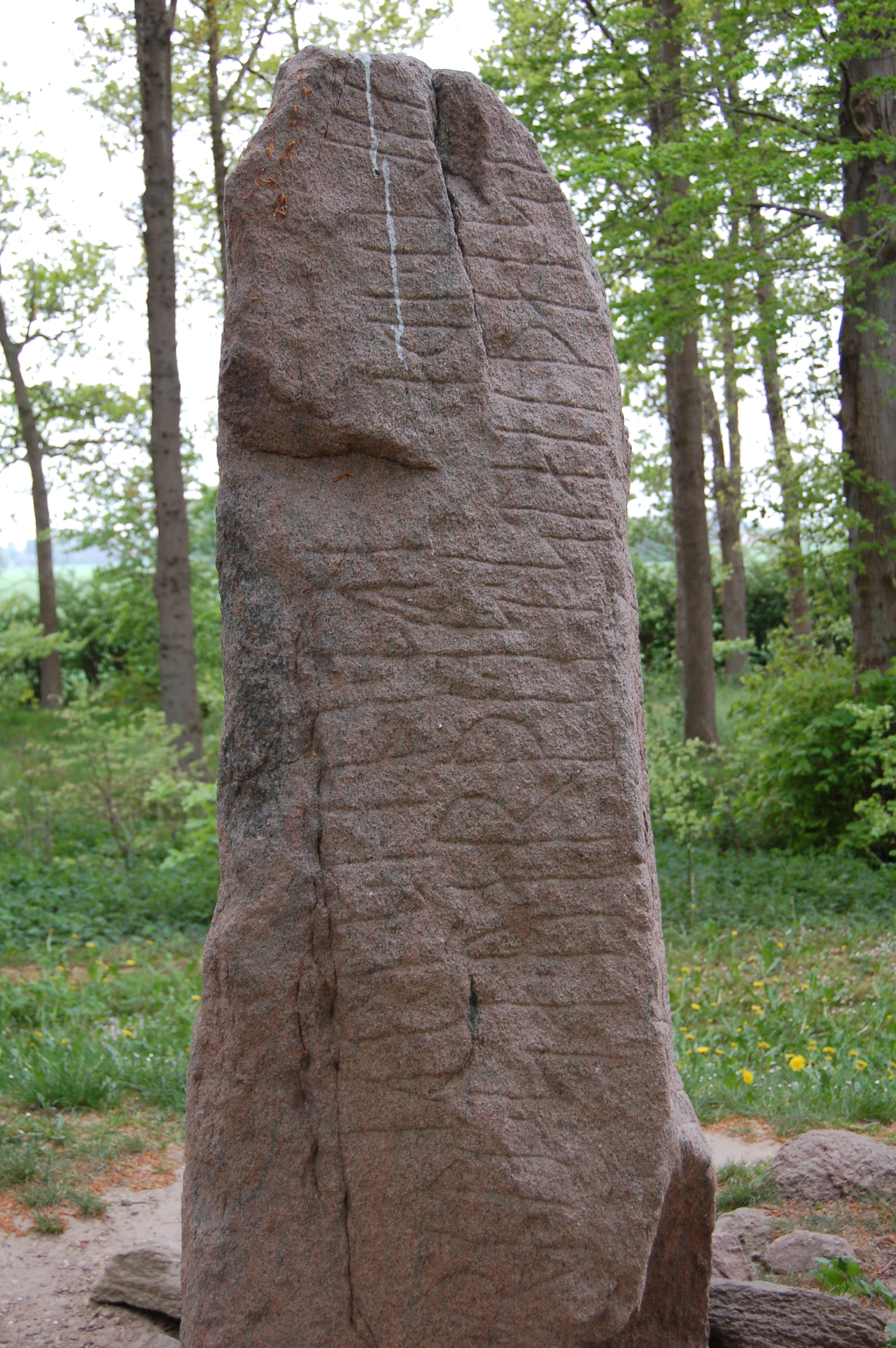 Photo of Glavendrup stone, a runestone in Funen, Denmark